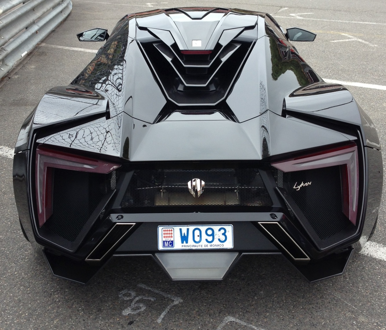 Principaute de Monaco april 2014